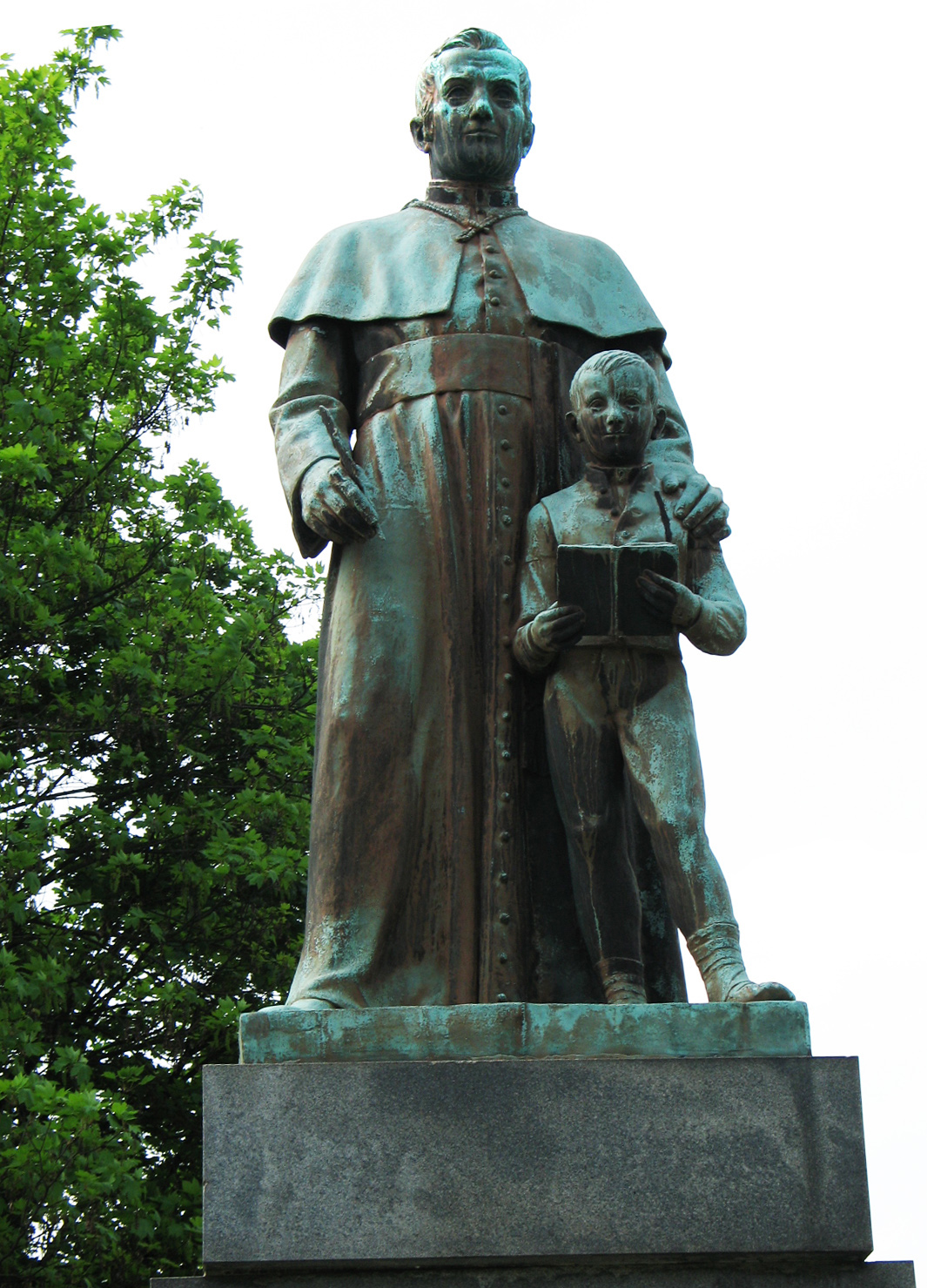 11. júna 1932 bola odhalená bronzová socha Alexandra Duchoviča (vysoka 3,15 m o hmotnosti 1140 kg)